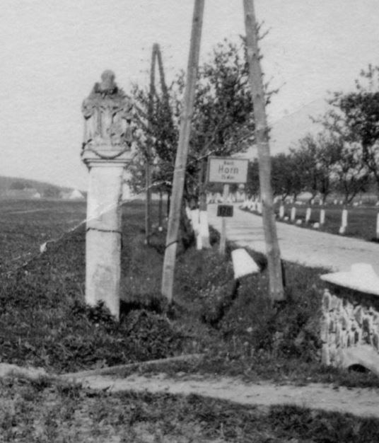 Gnadenstuhl Amelsdorf, Abzweigung Kellergasse von der Horner Straße.